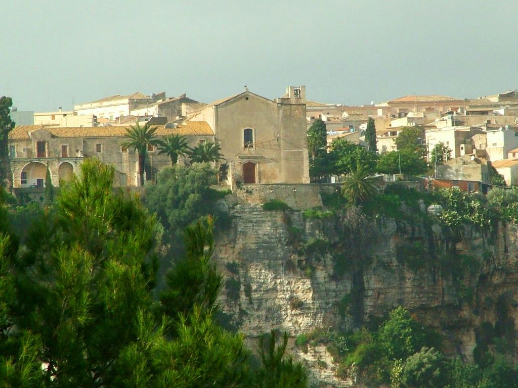 Ispica - Panorama - Santa Maria del Gesù